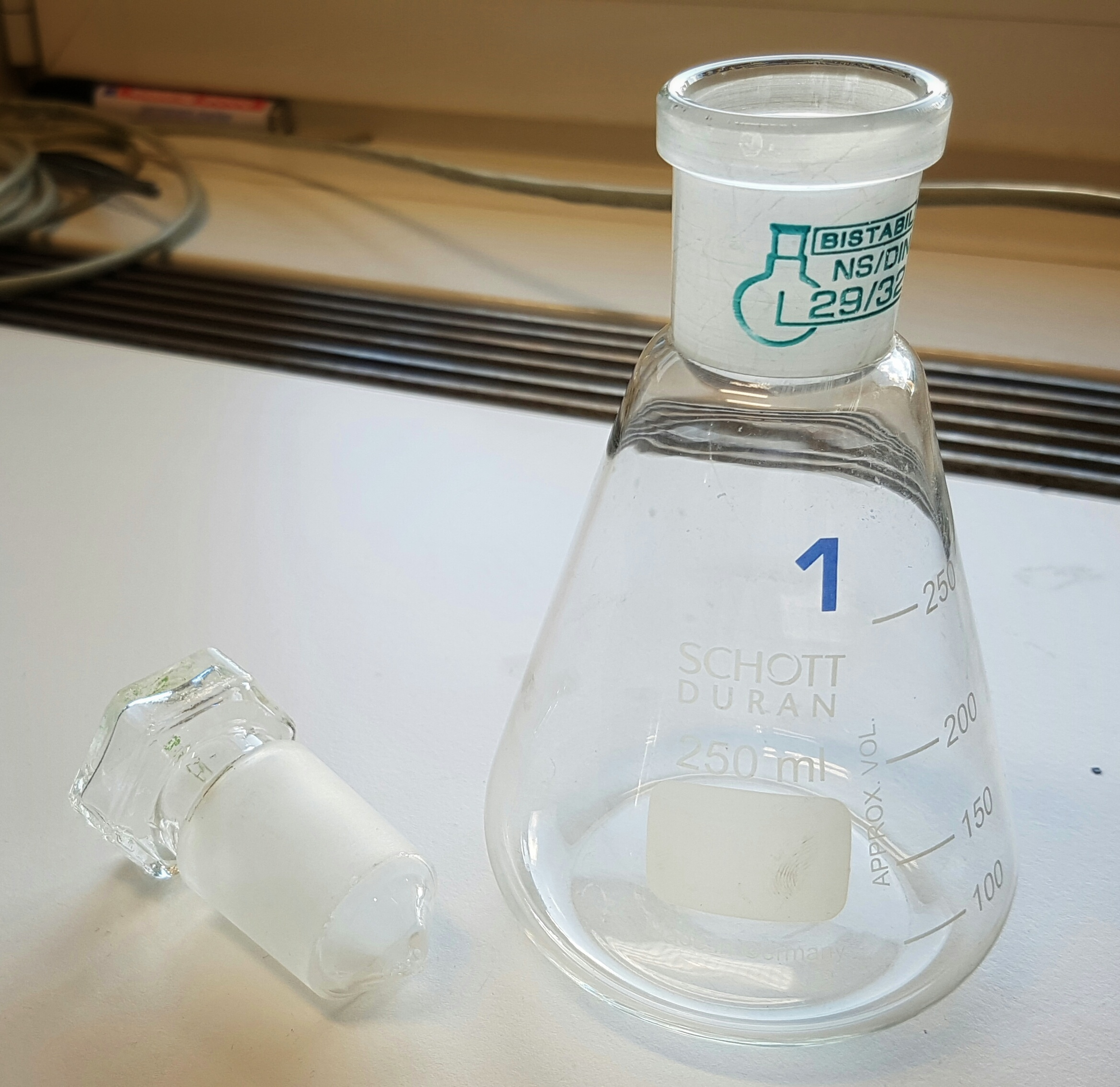 Jodzahlkolben mit Normschliffstopfen